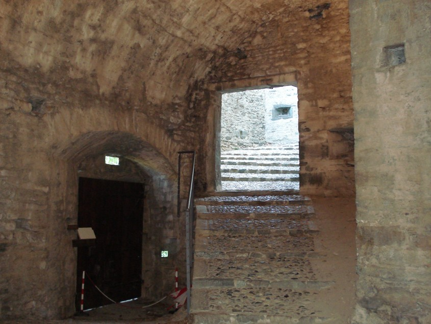 Ingresso del castello di Verres